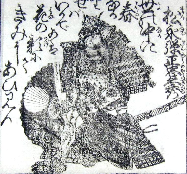 Matsunaga Hisahide(松永久秀)